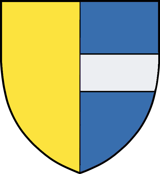 Vapensköld för svenska adelsätten Soop nr 10